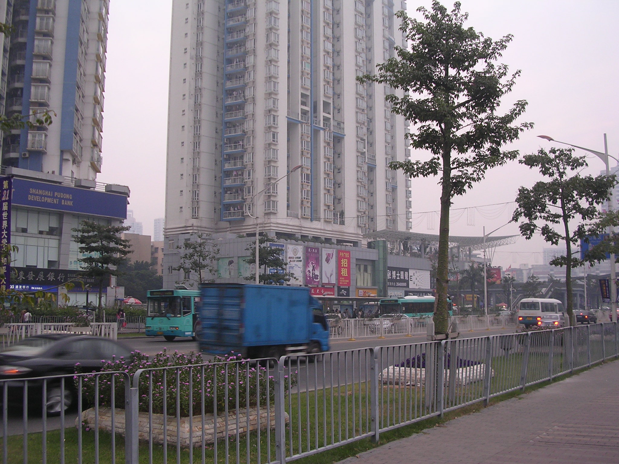 Nan-hai Main Road